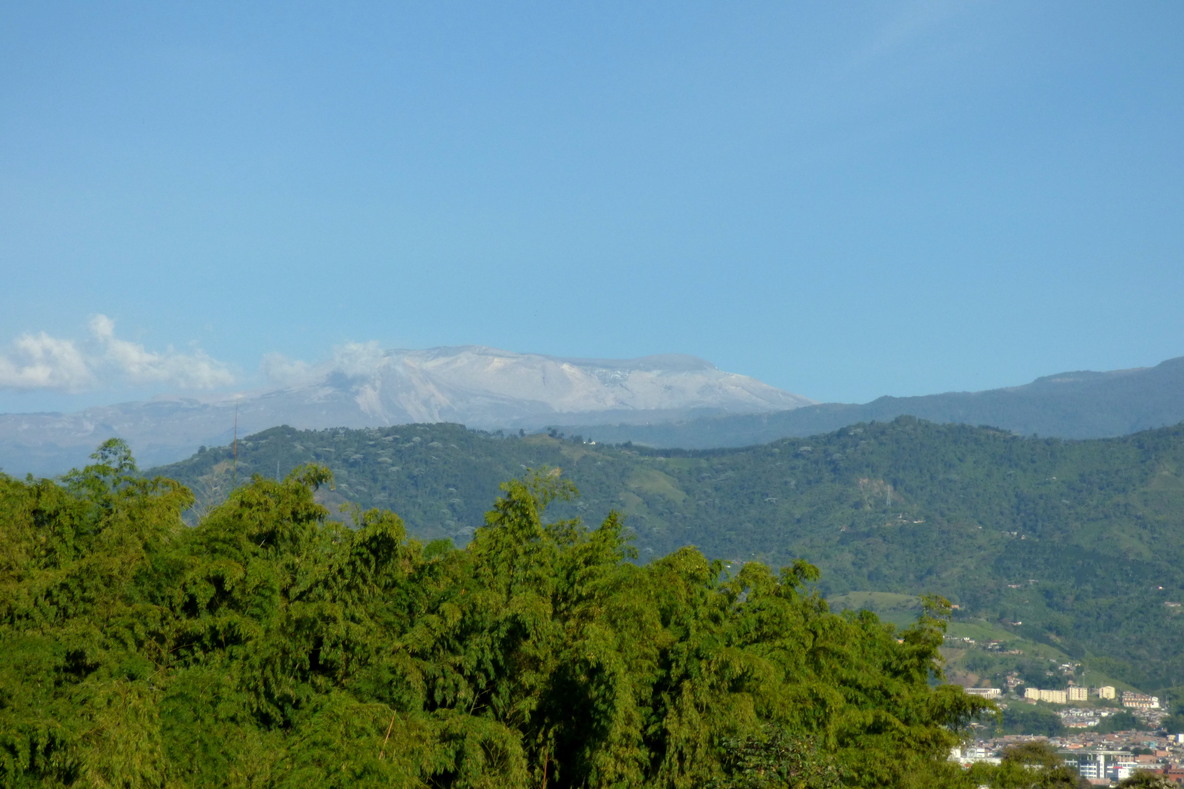 Nevado del Ruiz visto desde Pereira